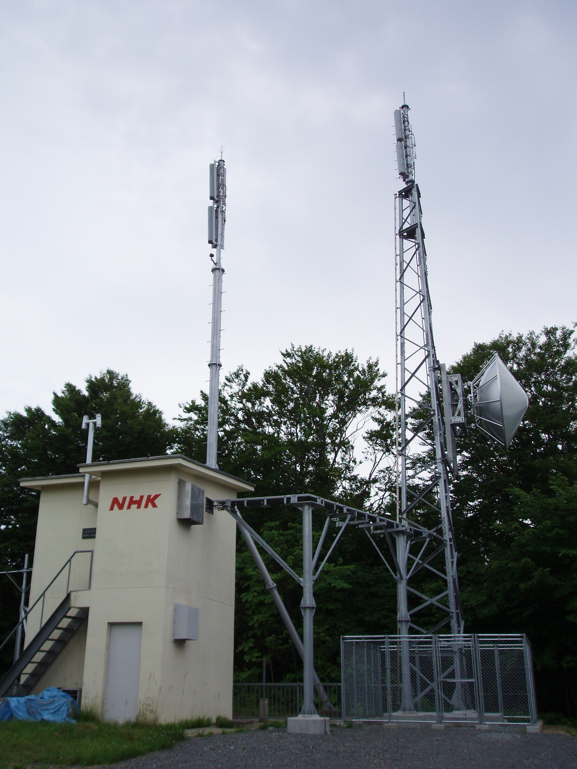 厚沢部中継局 NHK送信設備